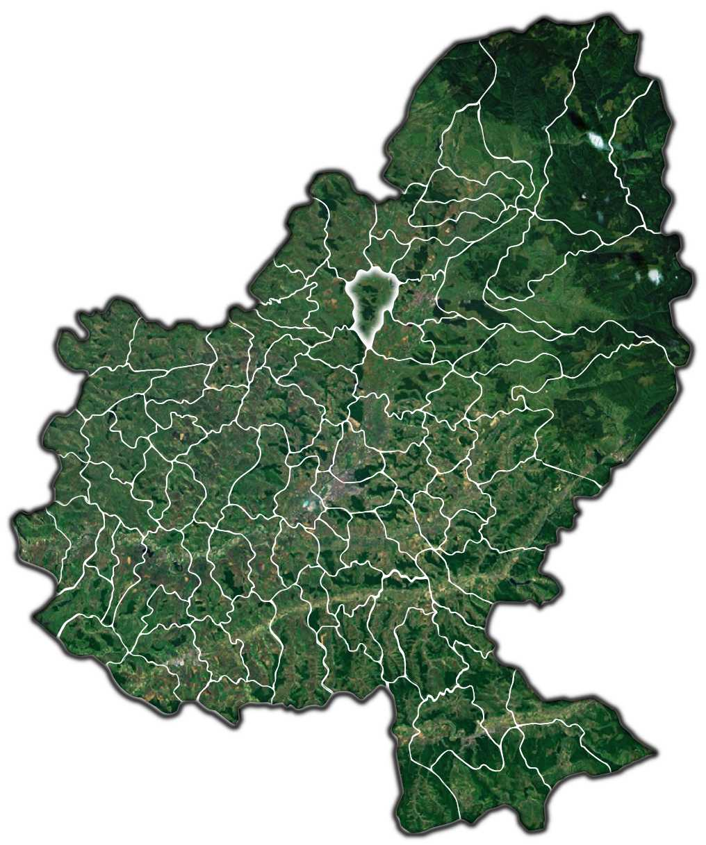 Reghin jud Mures